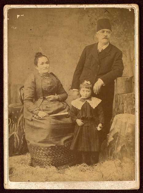 Никола Анастасов Робев, Мария Радева - Робева, Пенелопа Робева - Хаджиилиева